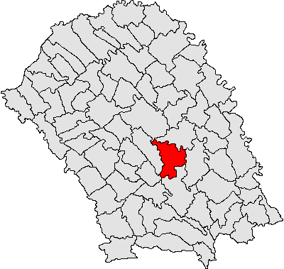 Categorie:Hărţi ale judeţului Botoşani